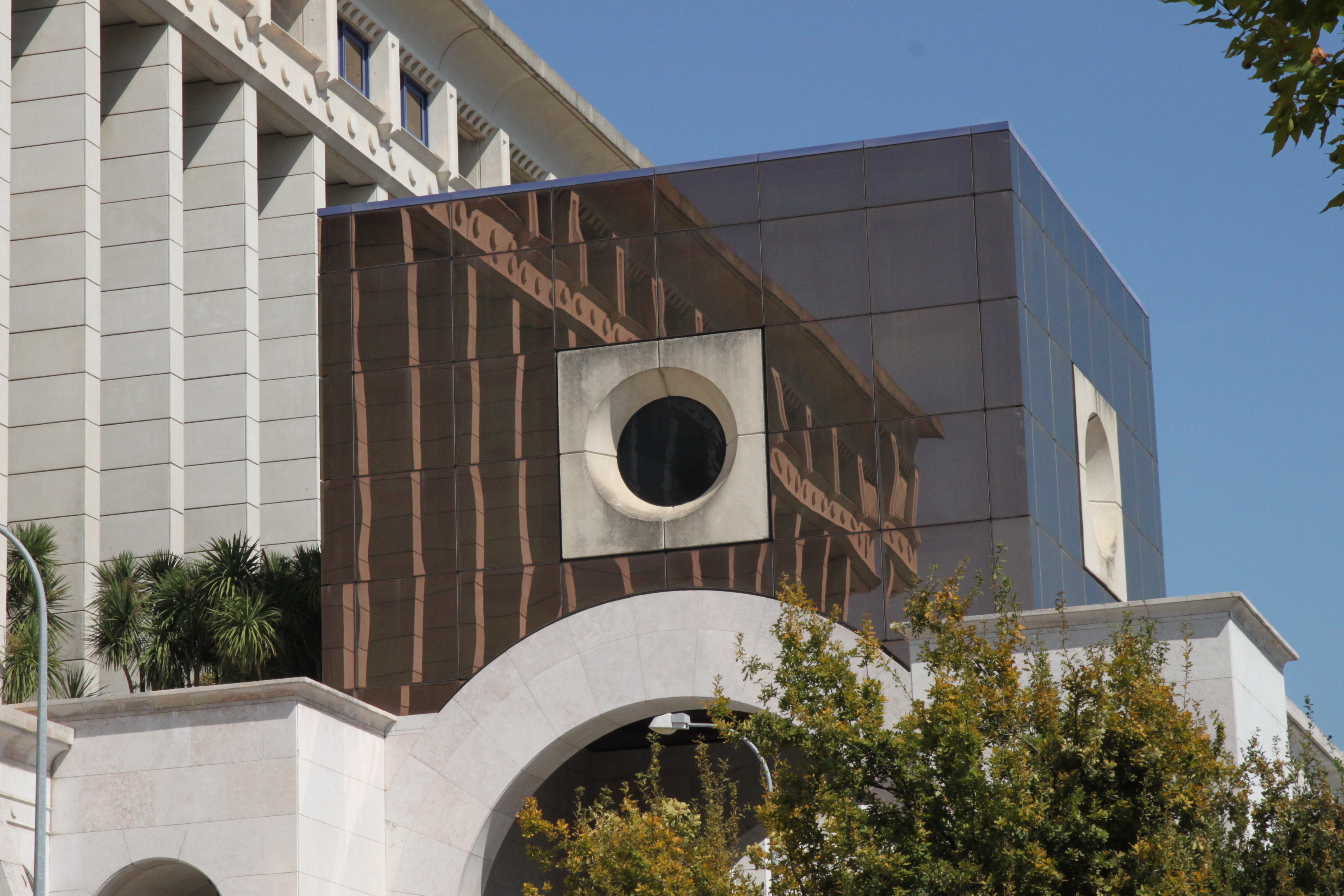 Edifício-sede da Caixa Geral de Depósitos, CGD, na Avenida João XXI This file was uploaded for Wiki Loves Monuments in Portugal with the unique identifier 97021442.